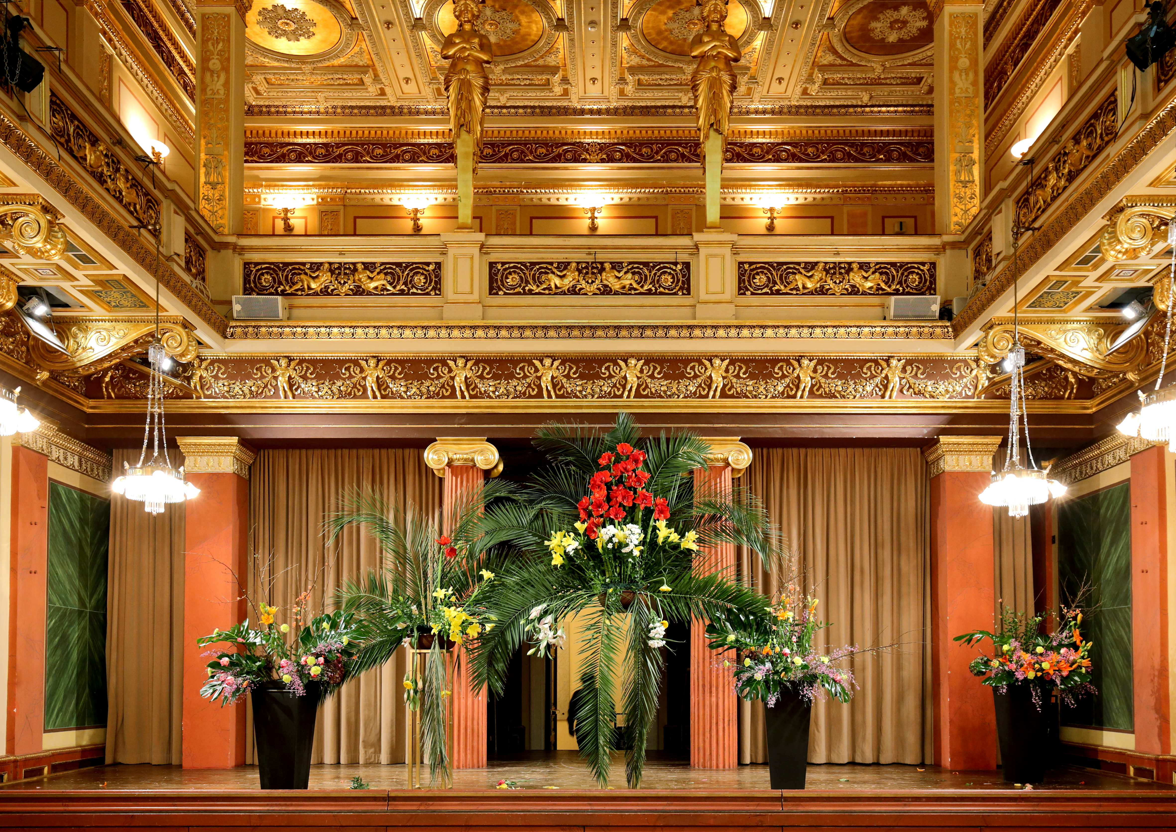 Podium bzw. Stirnseite des Brahms-Saales im Wiener Musikvereinsgebäude. Der Innenausbau besteht zur Gänze aus Holz, welches großteils lackiert wurde.